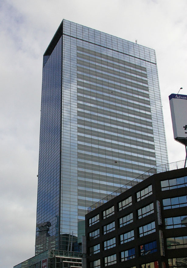 アエル。仙台駅前の再開発ビル。2005年8月投稿者撮影。